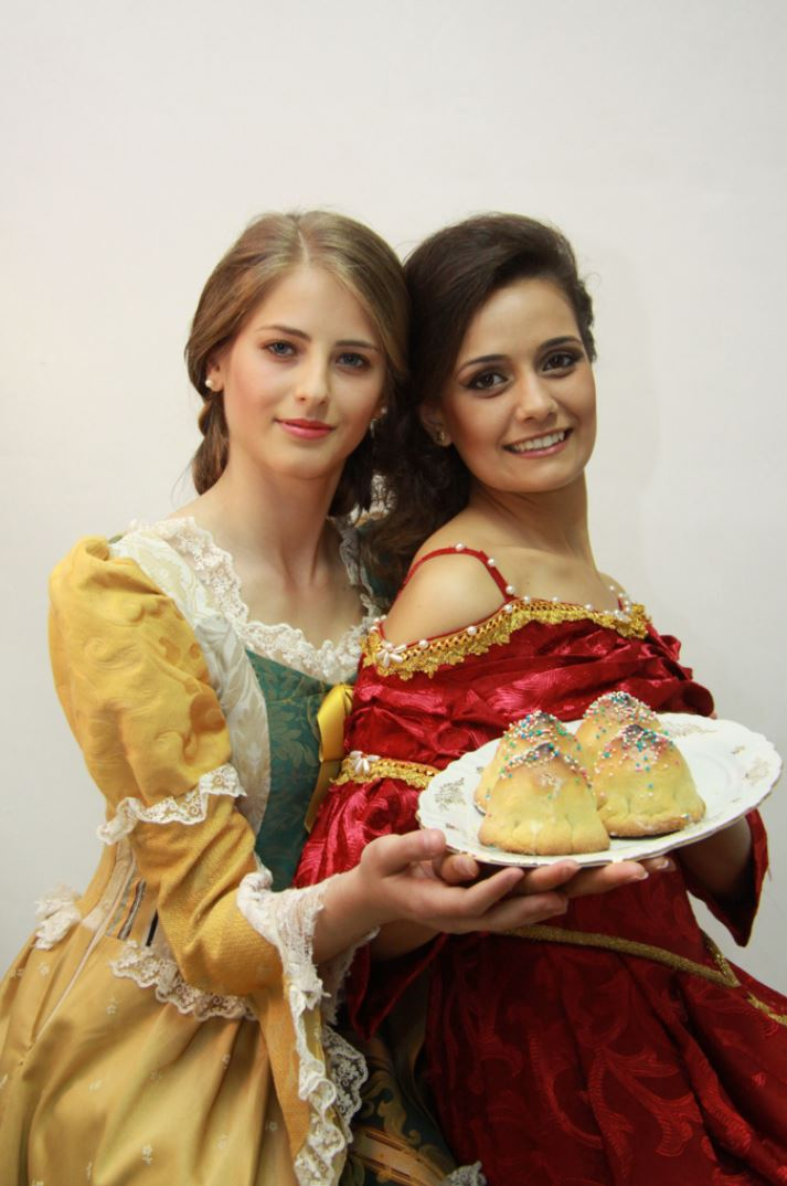 Due testimonial delle minni di virgini, dolce tipico di Sambuca di Sicilia, con abiti d'epoca siciliani.